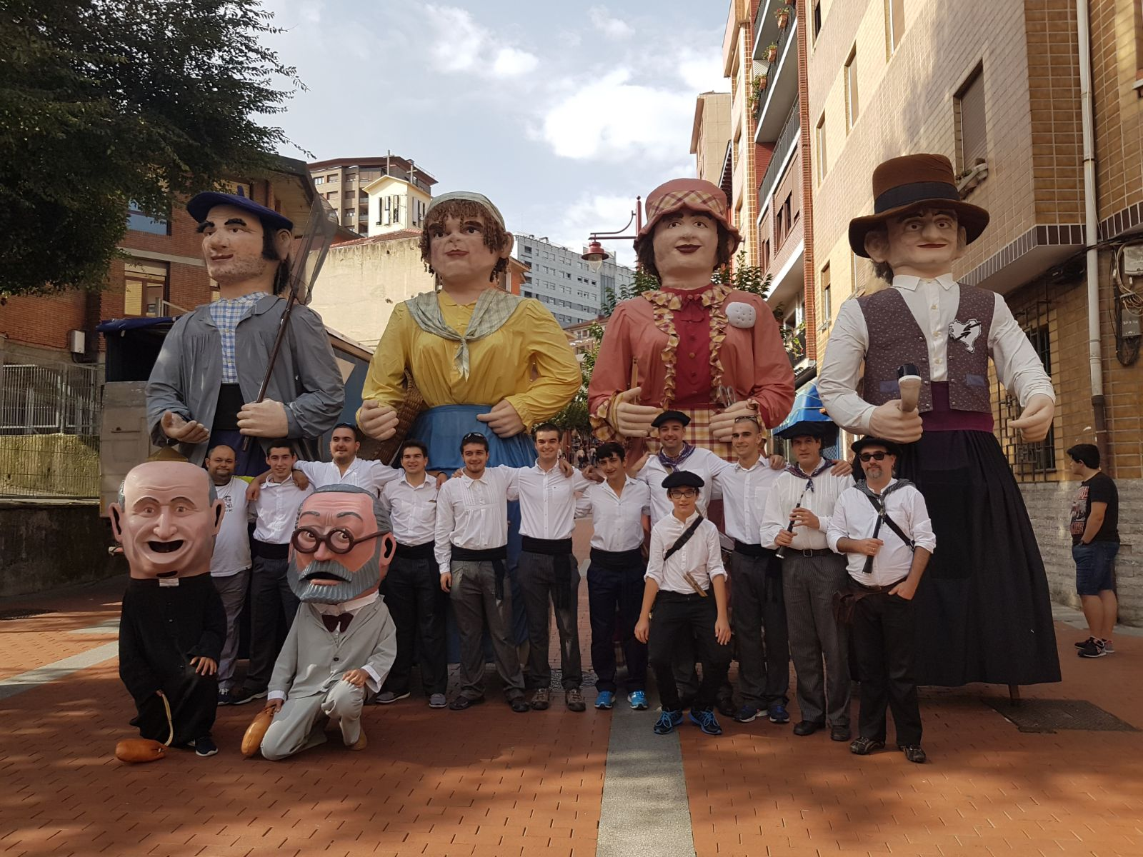 Mairuek Bagatza